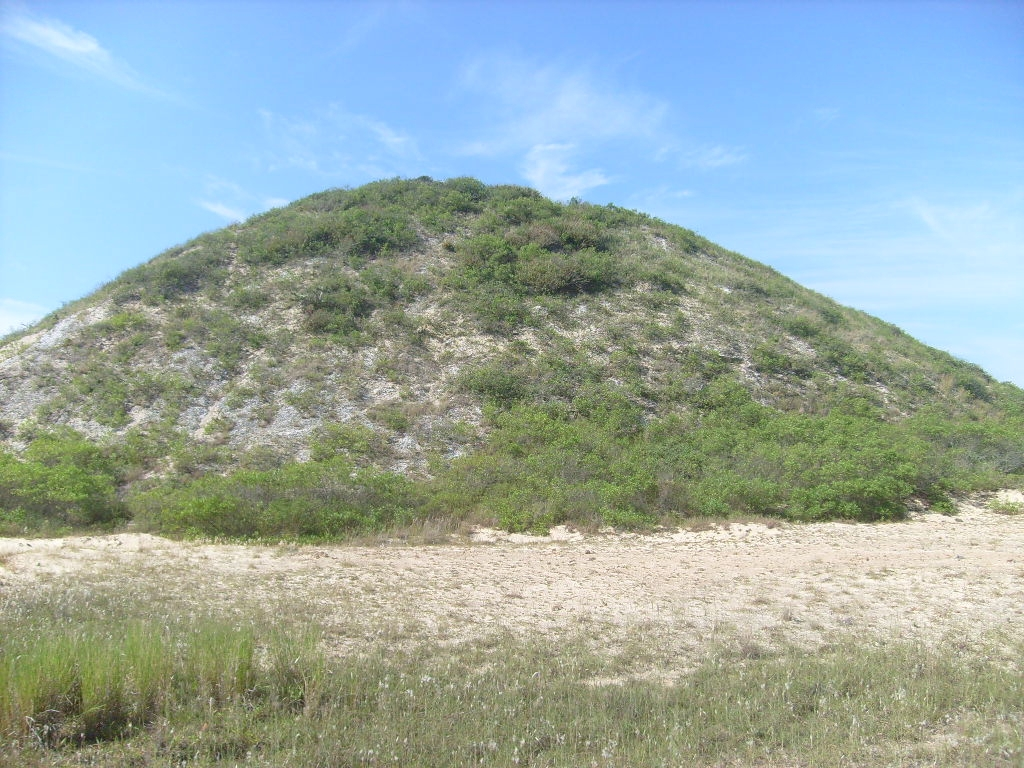 Foto aérea dos sambaquis Figueirinha II (1º plano) e Figueirinha I (2º plano)